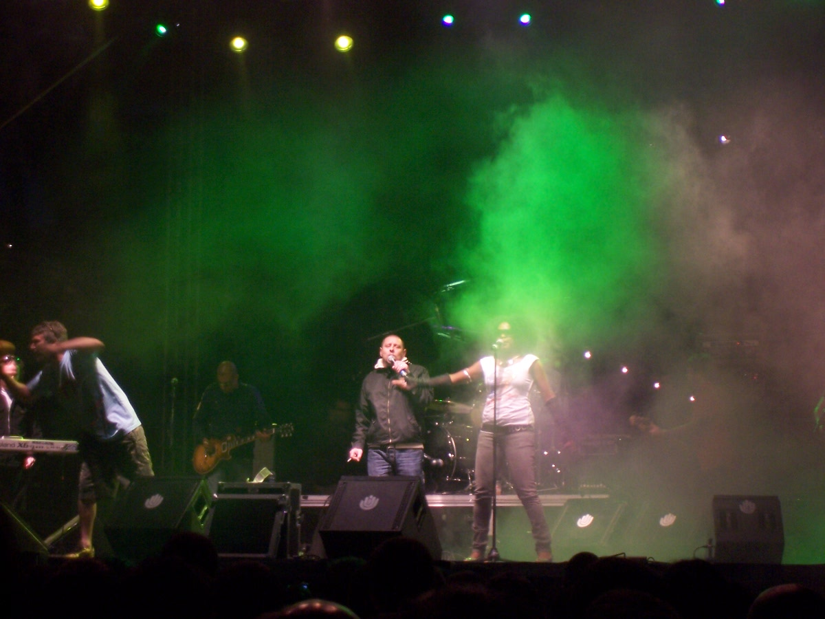 Concerto dos Happy Mondays Festa de inauguração da FNAC Corunha 19/06/2007